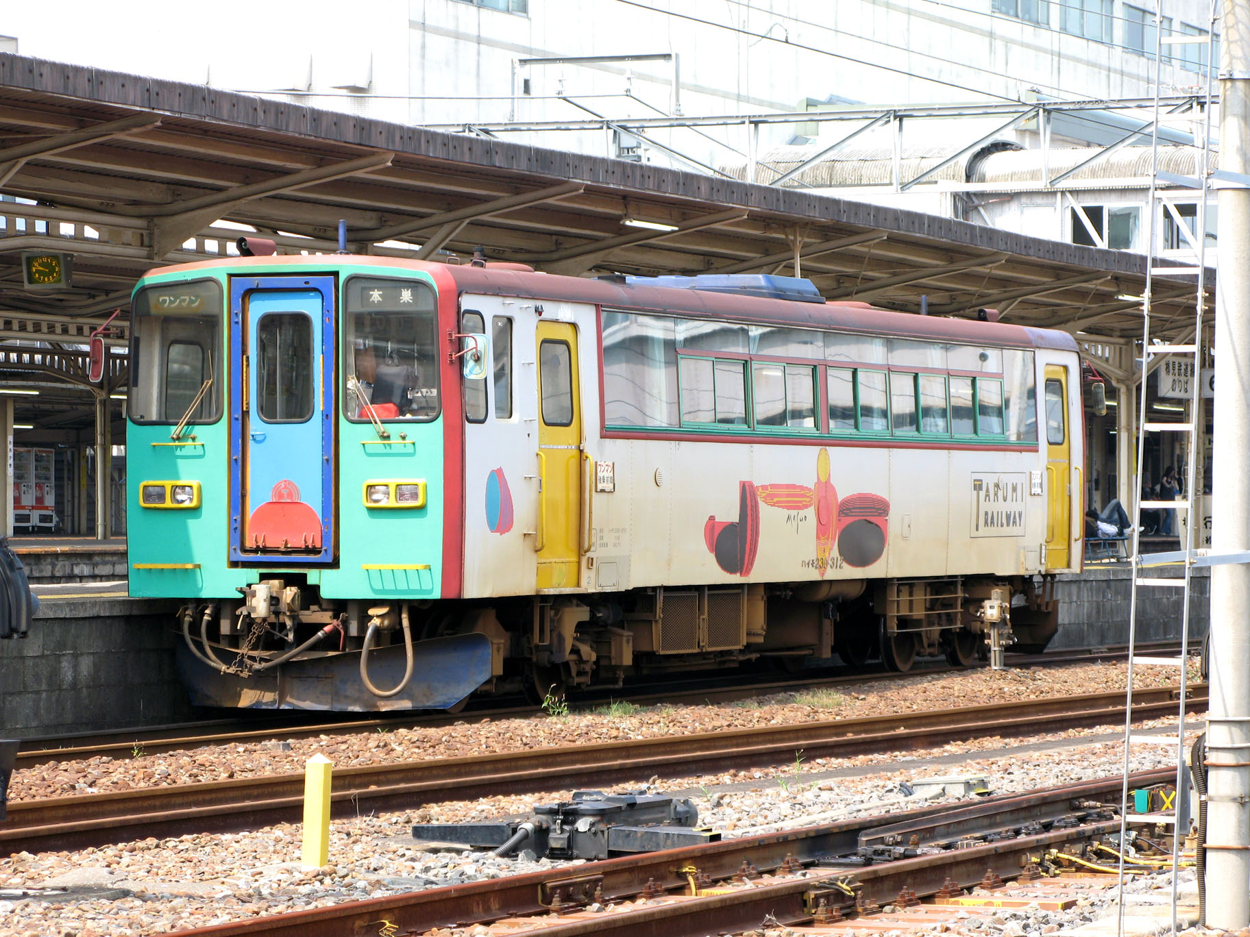 樽見鉄道ハイモ230-312形気動車（大垣で撮影） 2007年7月撮影。 機材：PowerShot G7